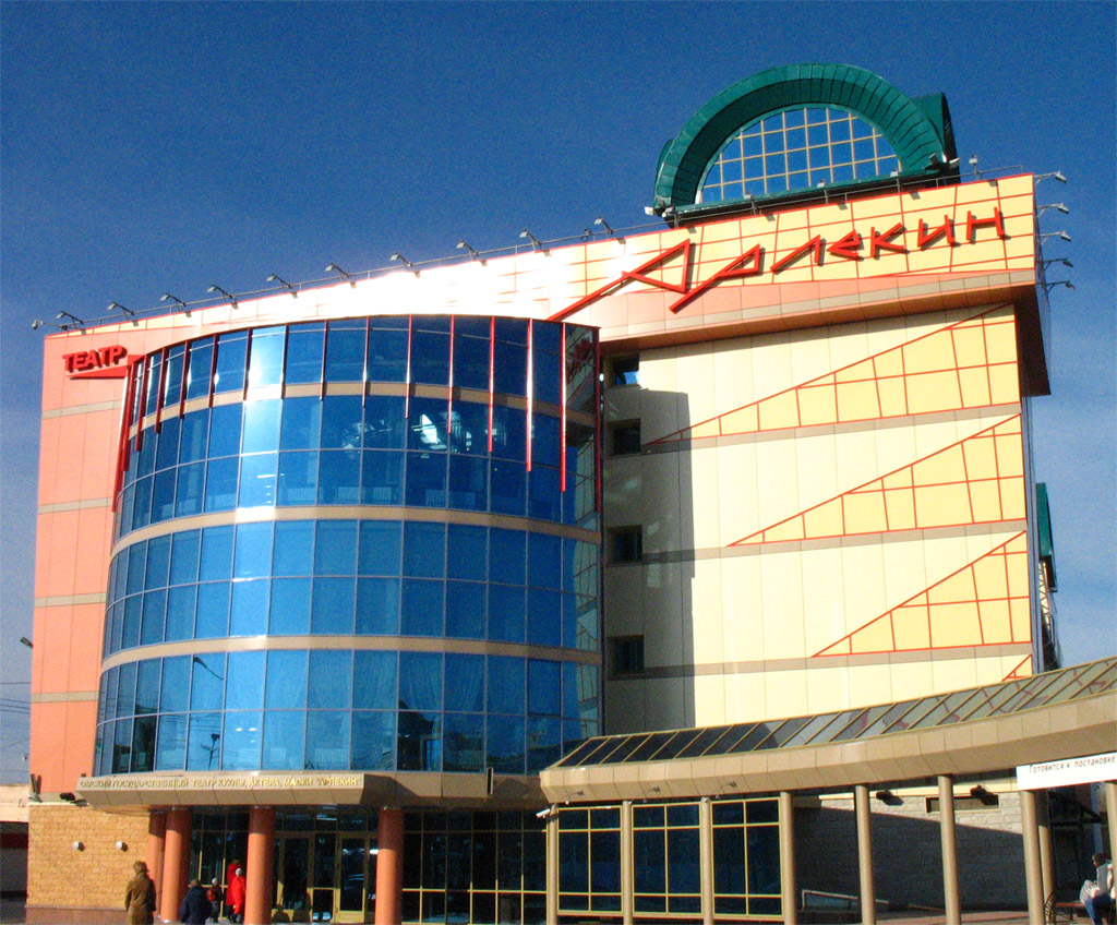 Театр кукол "Арлекин"